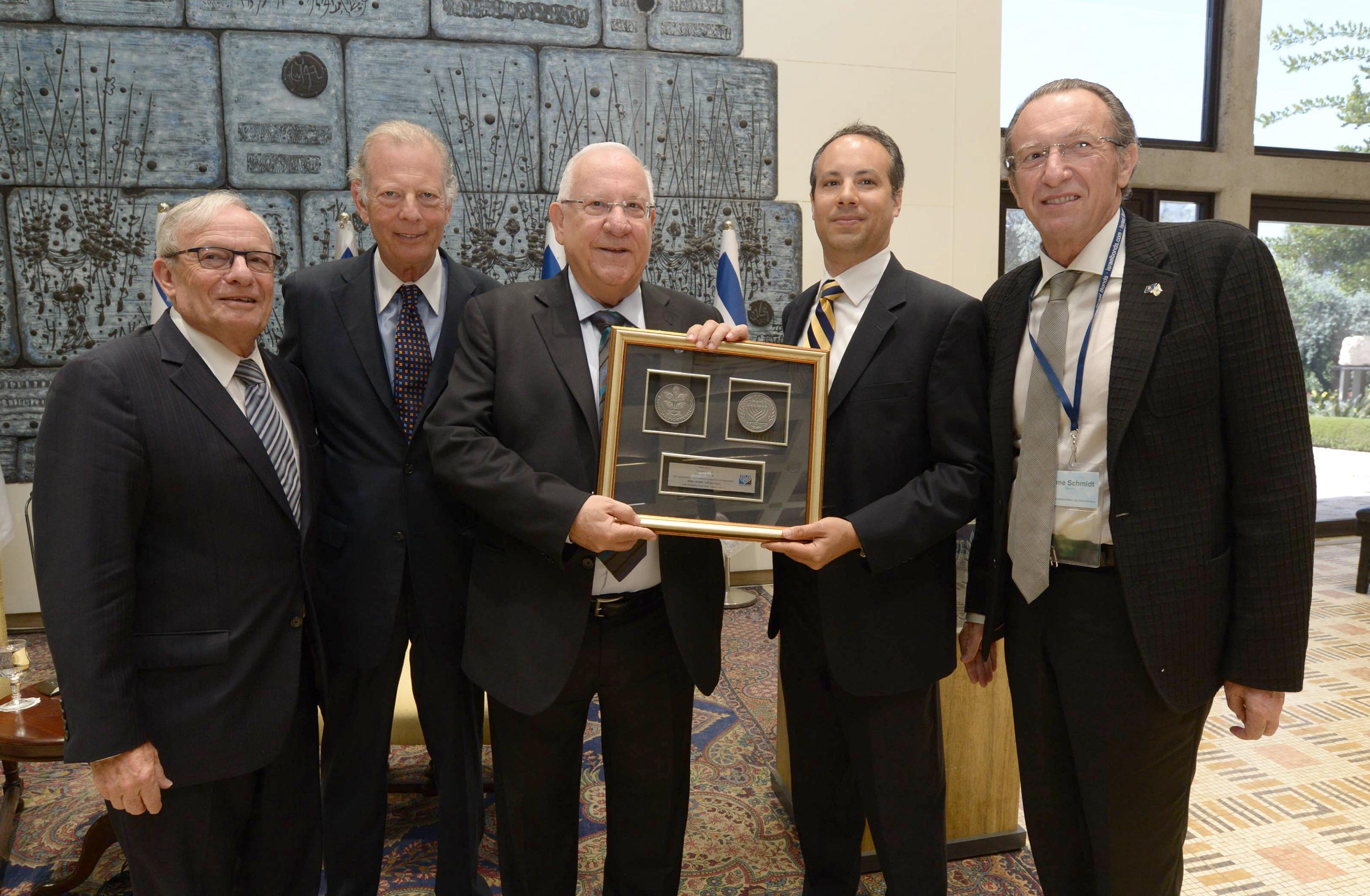 משלחת הבונדס בעת ביקורה בישראל בפגישה עם נשיא המדינה ראובן ריבלין